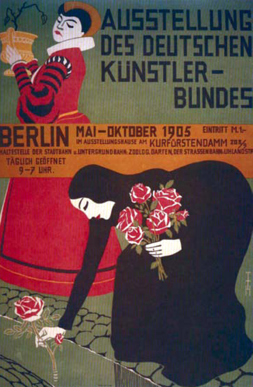 Plakat Ausstellung des Deutschen Künstler-Bundes, Berlin 1905